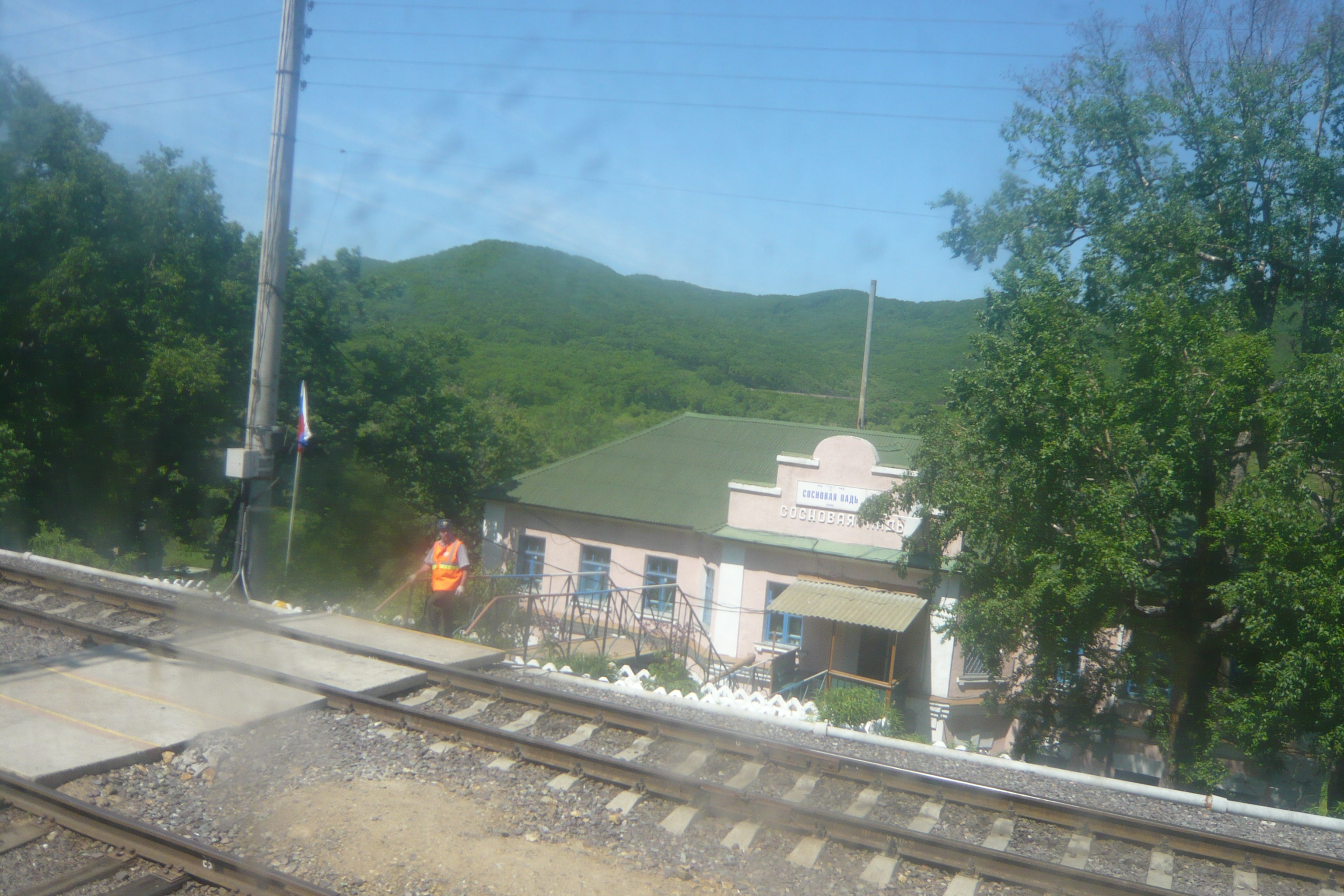 Сосновая Падь